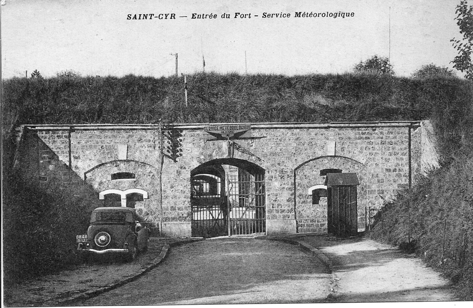 Fort de Saint-Cyr